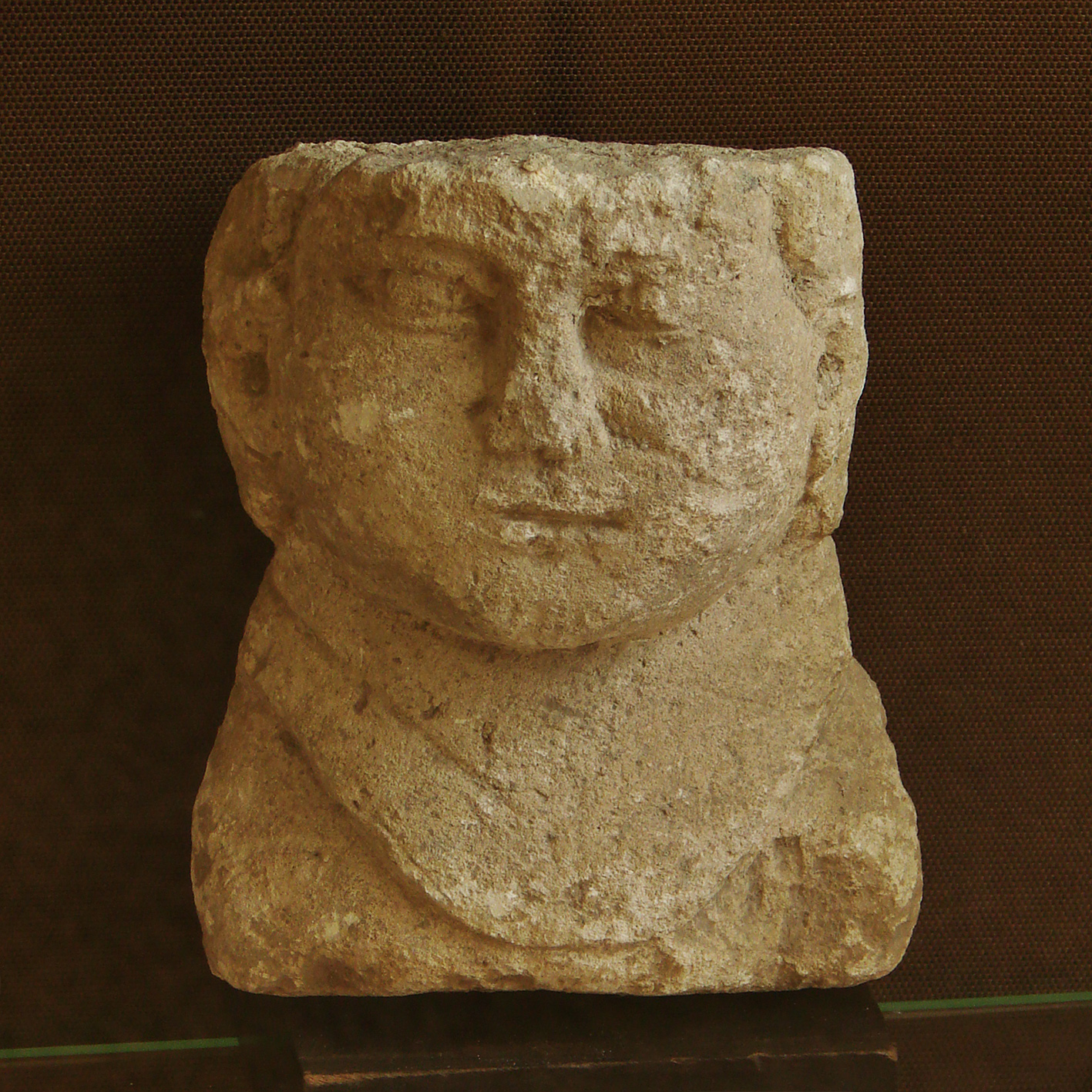 Ex-voto en pierre provenant du sanctuaire gallo-romain de la forêt d'Halatte, près de Senlis. Ce sanctuaire, consacré à une divinité guérisseuse non identifiée, a été bâti vers 50 + JC. On y a retrouvé plus de 350 ex-voto; les ex-voto en pierre étaient à l'origine enduits et peints. Musée de Laon (exposition temporaire du fond du Musée de Senlis).